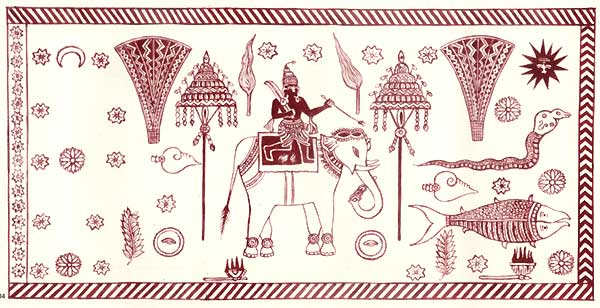 Karava main flag